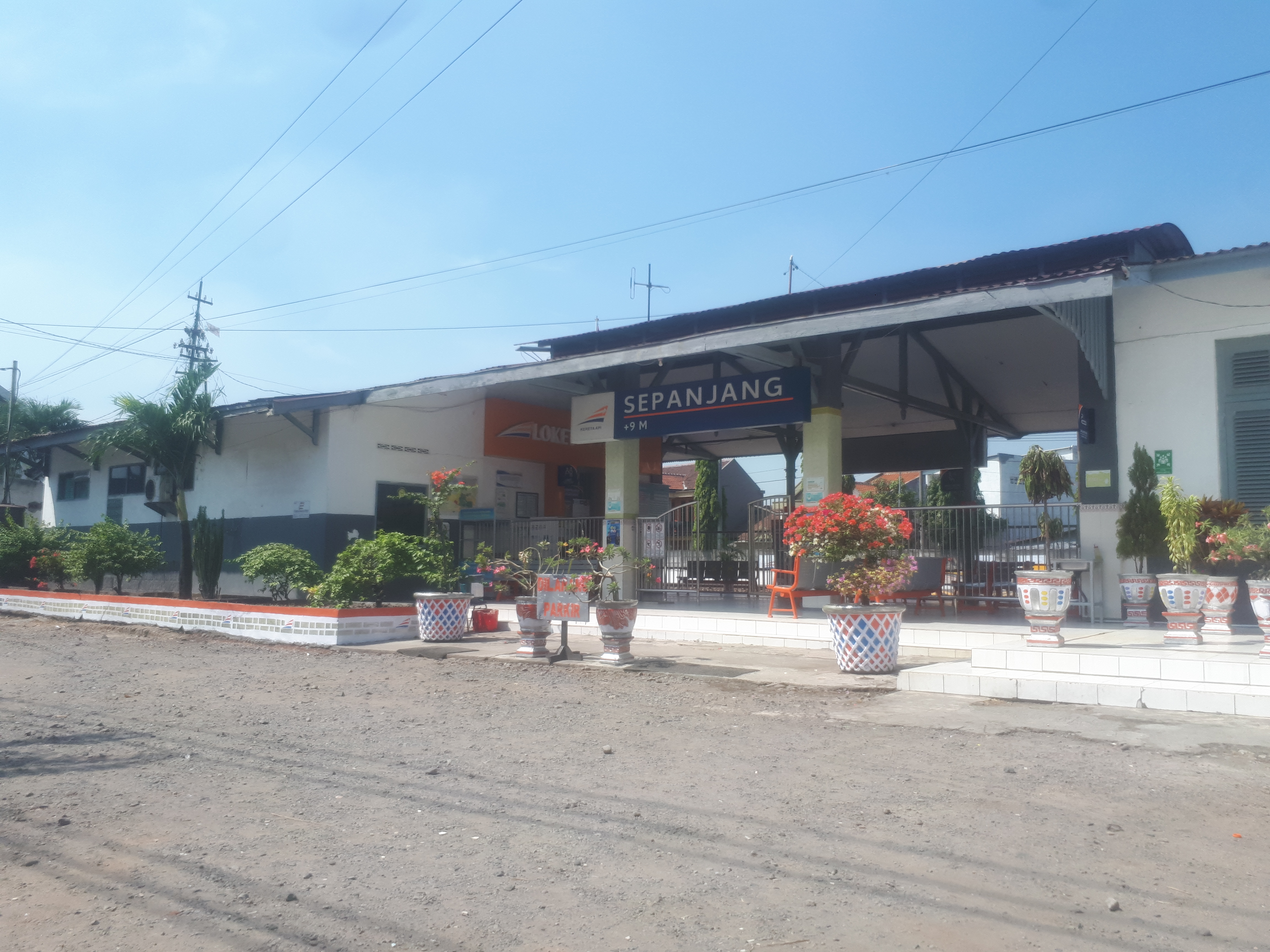 Tampak depan Stasiun Sepanjang, 2020